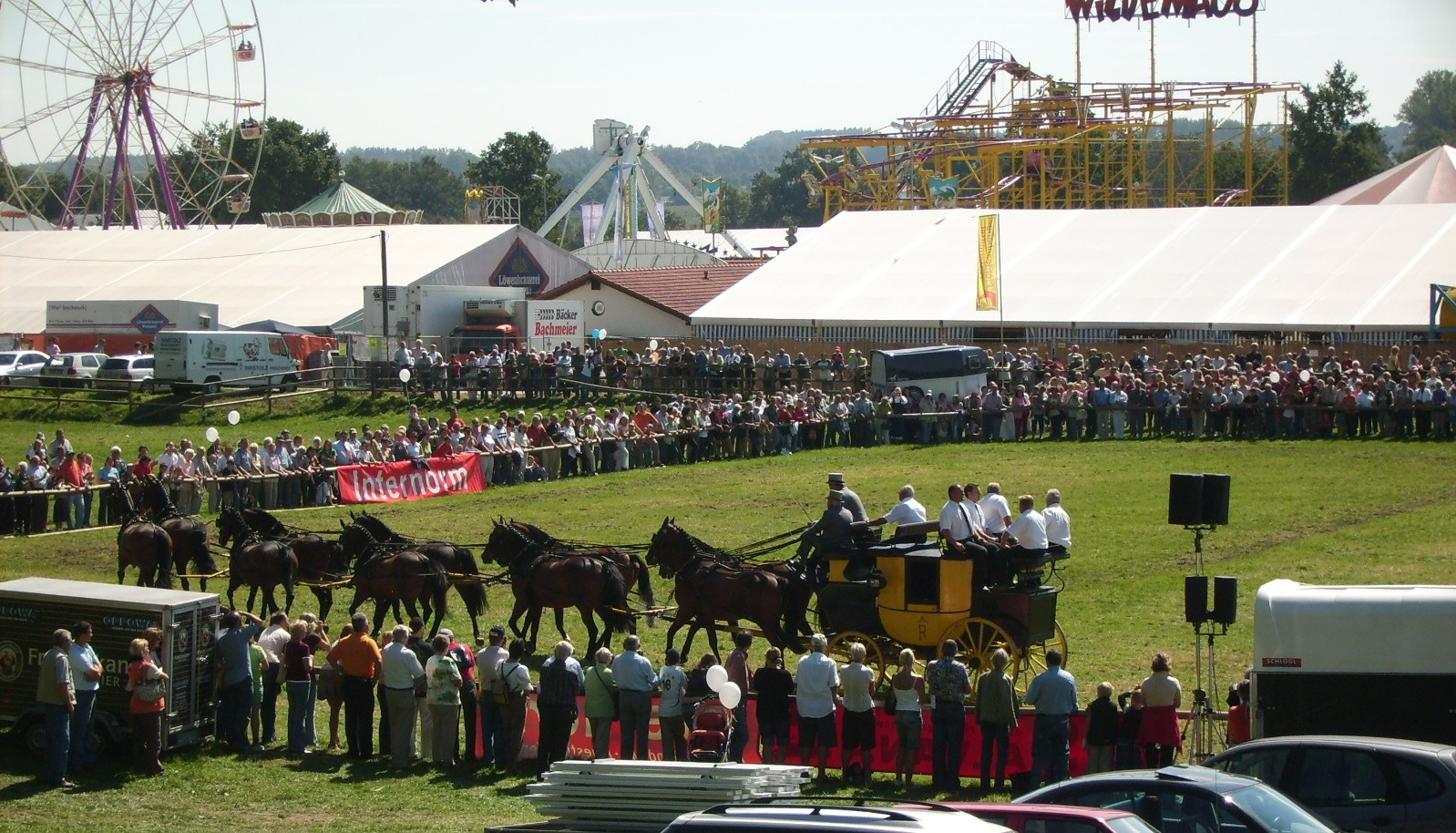 Vorführung des Rottaler Zehnerzuges auf dem Karpfhamer Fest 2006